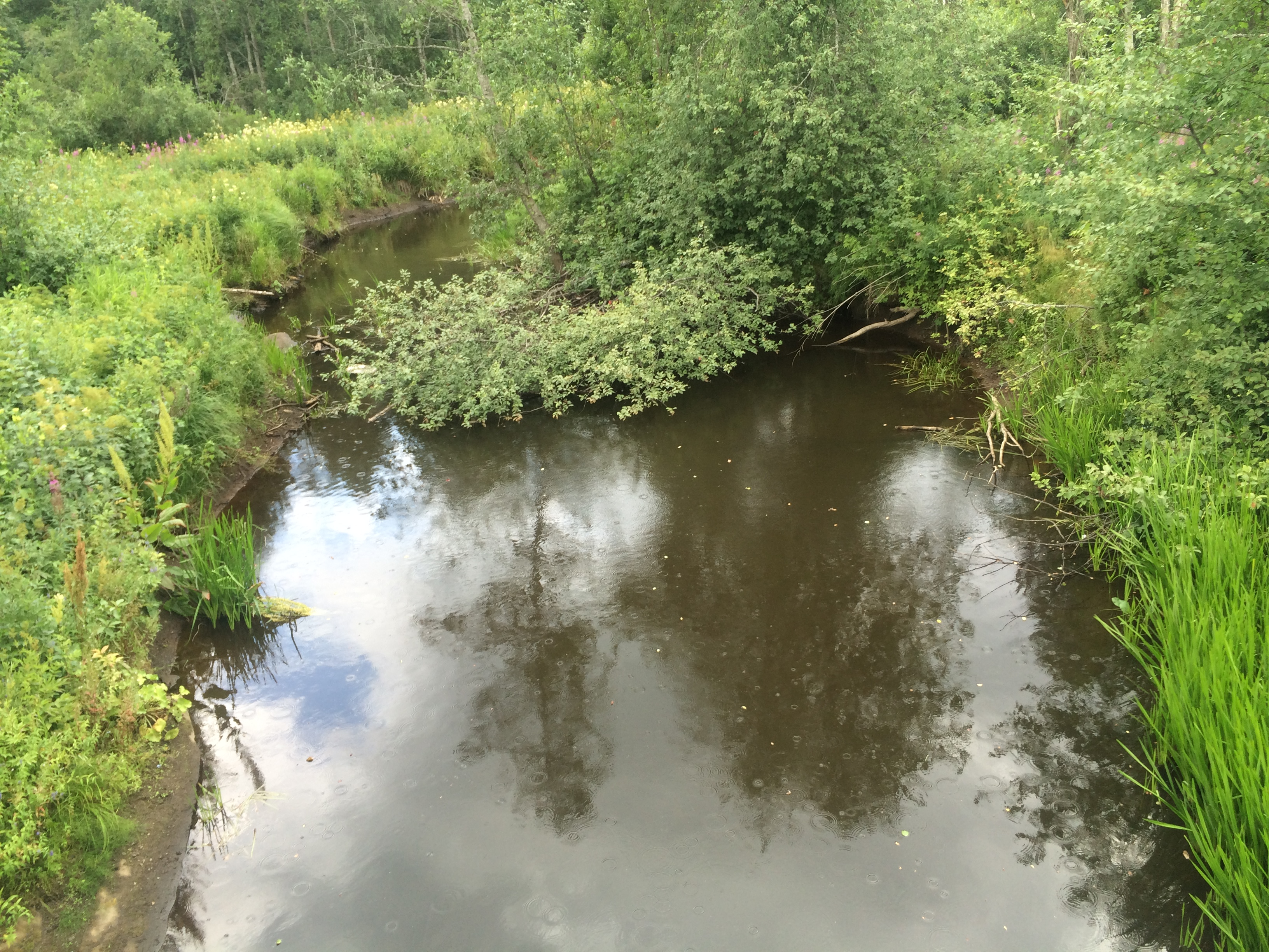 река Пяля